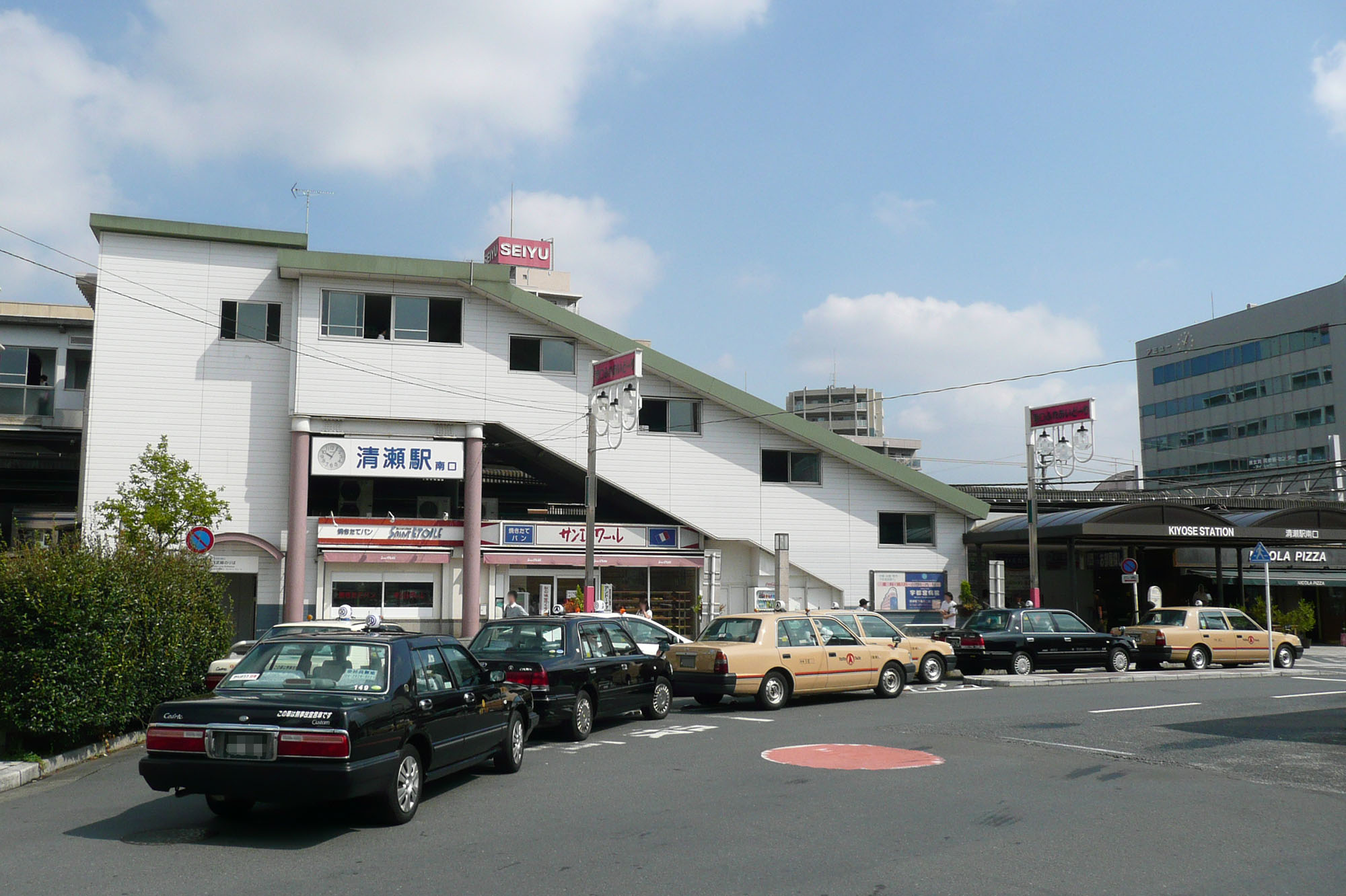 清瀬駅南口